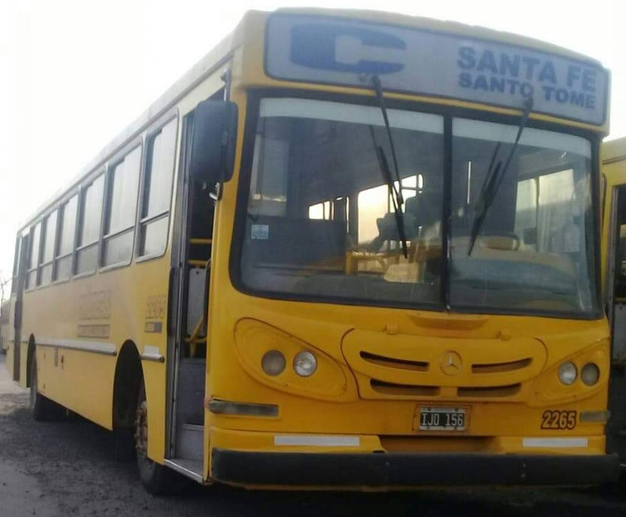 Mercedes-Benz OF de la línea 250, vulgarmente conocida como "C"